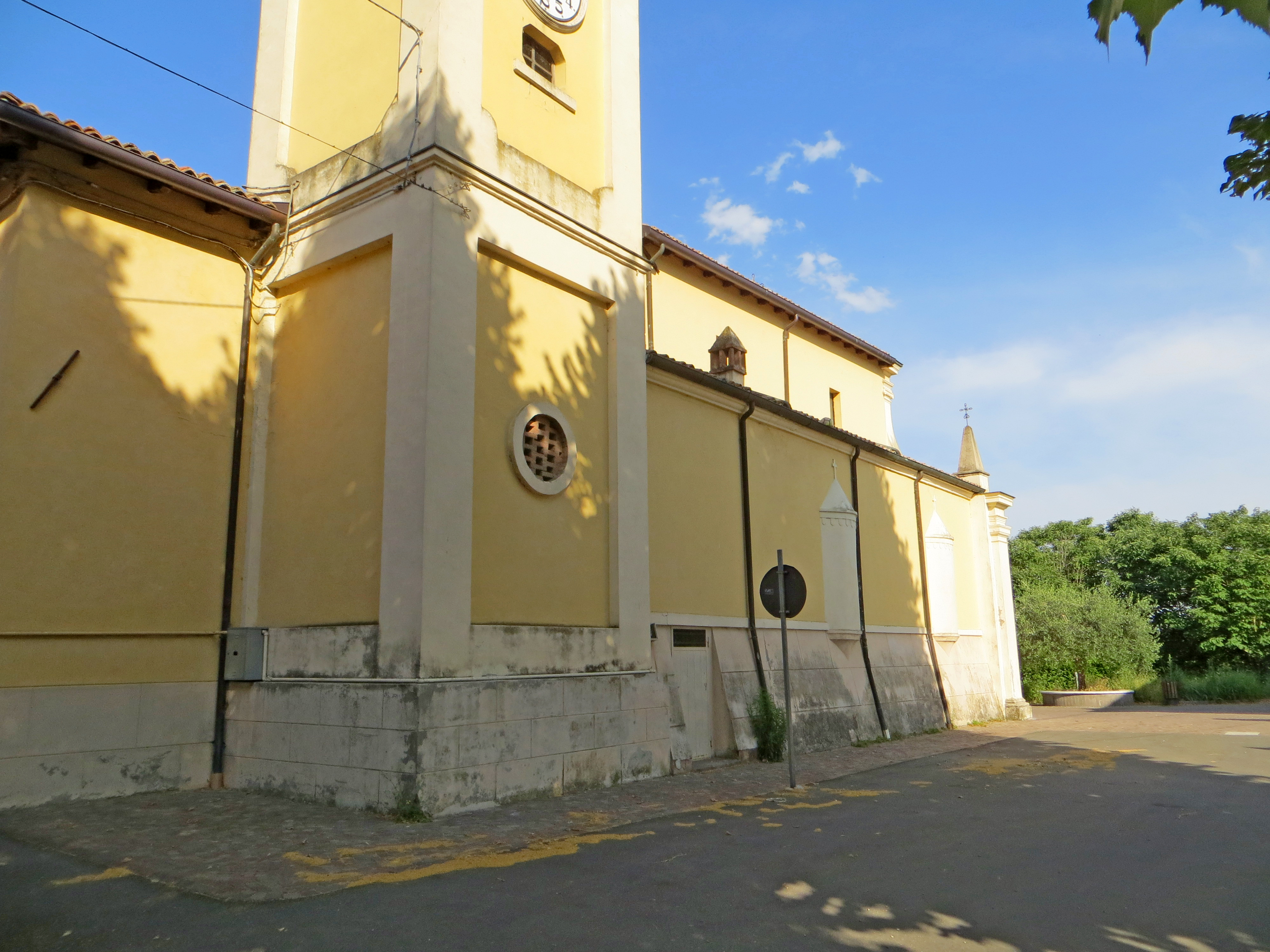 Chiesa di San Lorenzo (Tortiano, Montechiarugolo) - lato sud